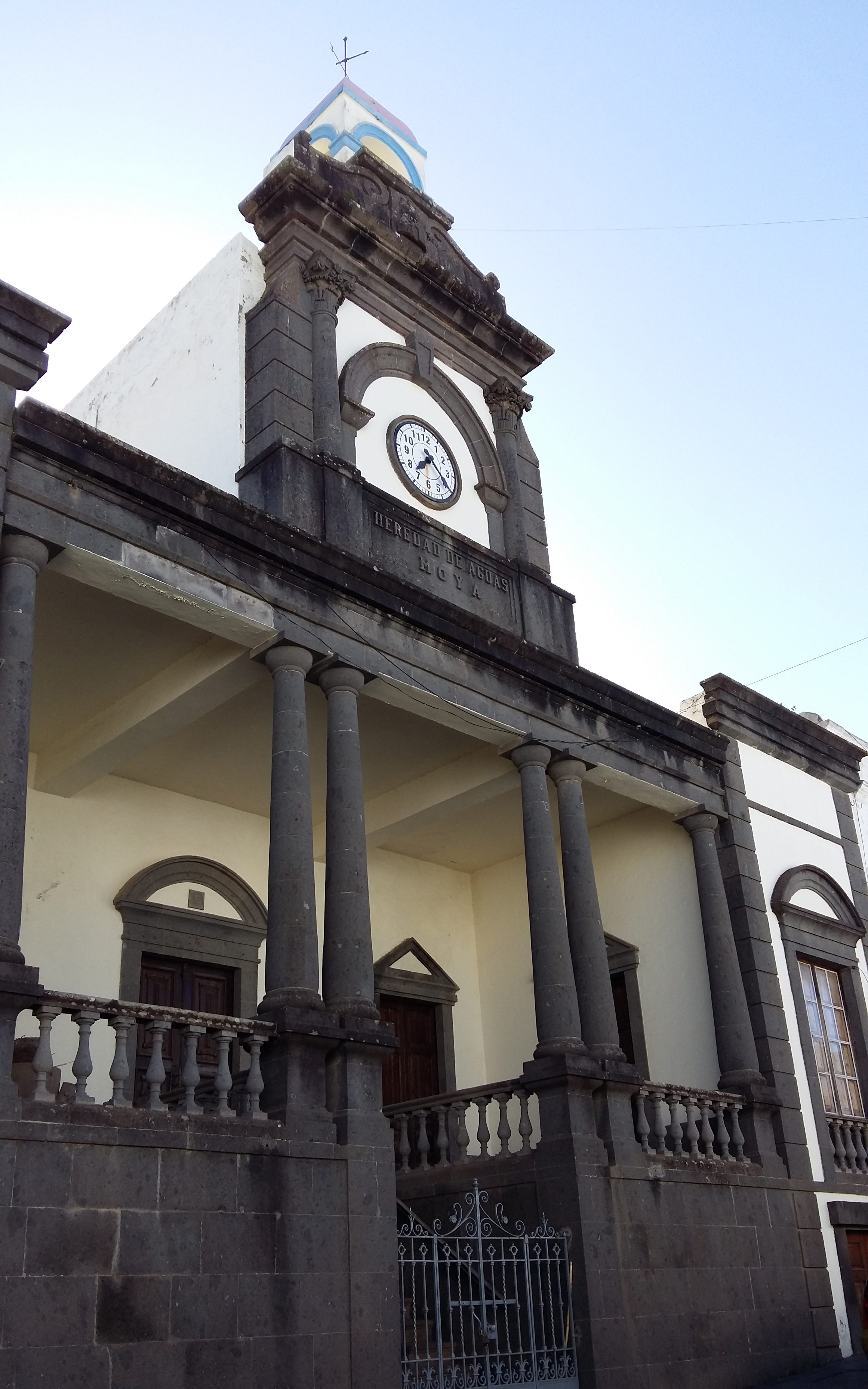 Edificio de la Heredad de Aguas de Moya (antiguamente, Heredad de Aguas de los chorros, propios y del Laurel), situado en el número 5 de la calle León y Castillo, en Moya, Gran Canaria